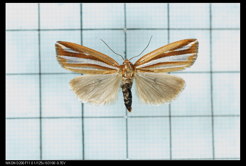 Narangodes argyrostrigatus Sugi, 1990 鞍1:P.75,Pl.22-18